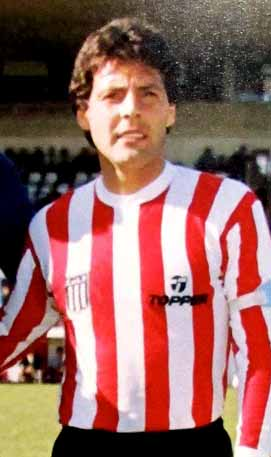 Miguel Ángel Russo, futbolista de Estudiantes de La Plata, durante el Torneo Metropolitano 1984.